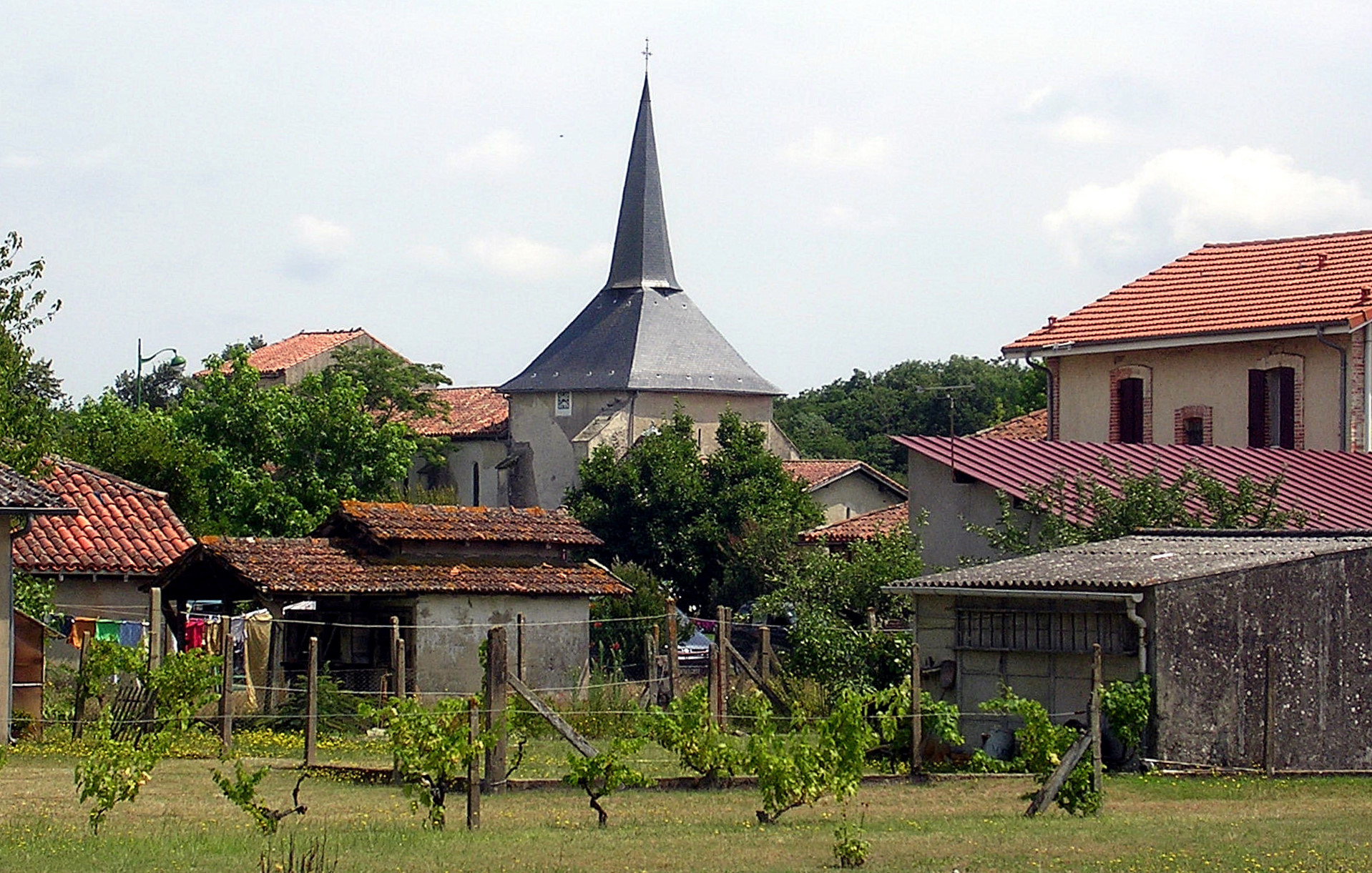 Saint-Paul-en-Born (Landes, France). Vue de l'église